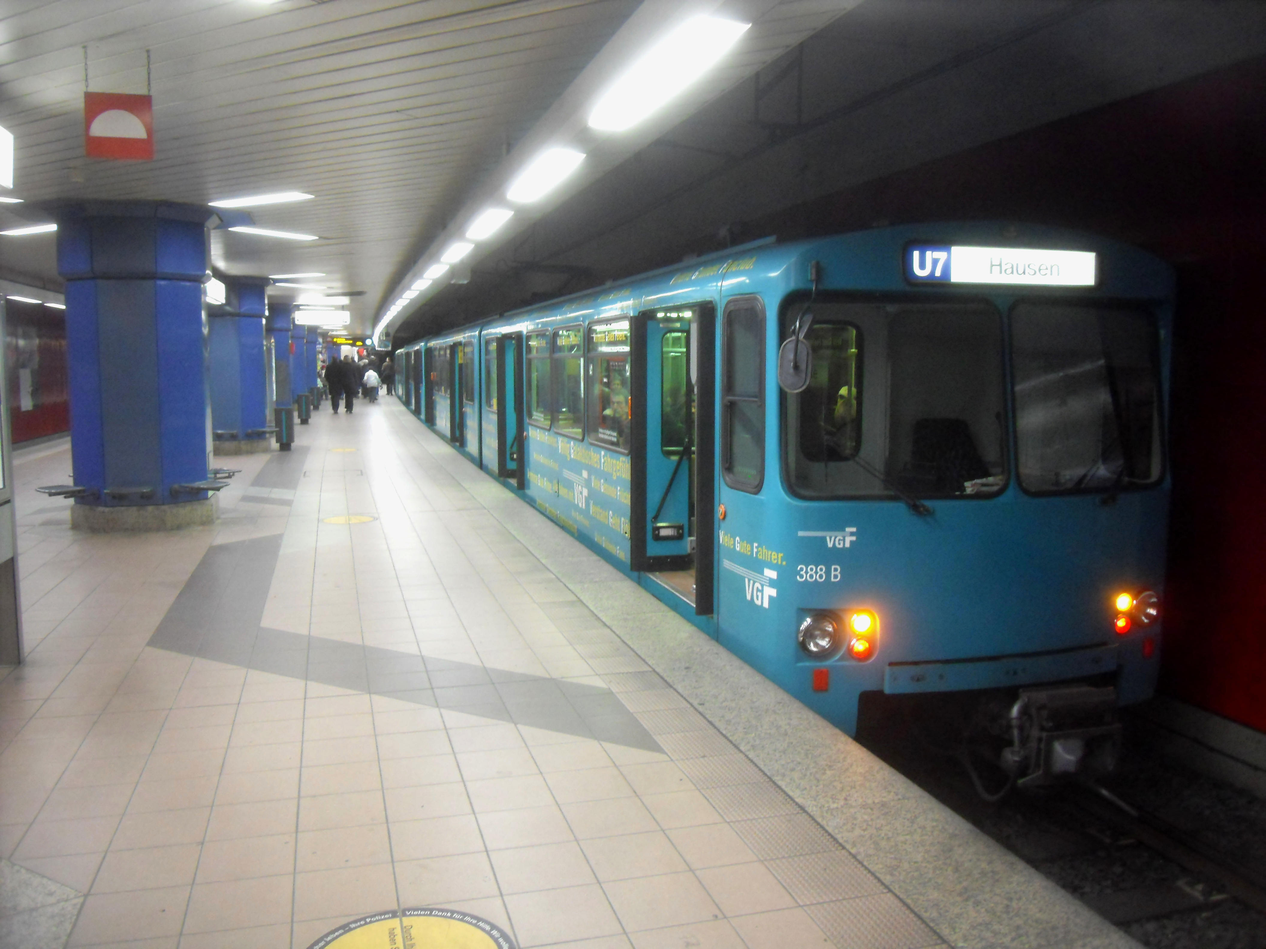 U 2-Triebwagen der U-Bahn Frankfurt im U-Bahnhof Eissporthalle auf der Linie U 7 auf dem Weg nach Frankfurt-Hausen in Hessen (Deutschland)